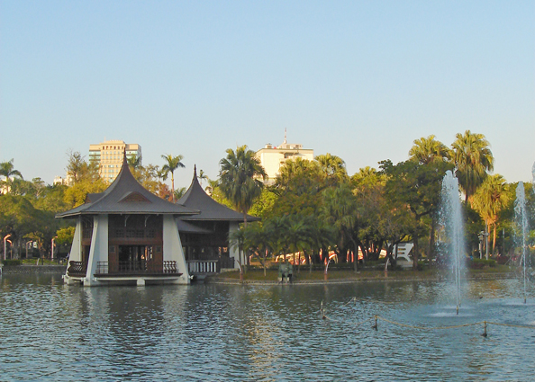 臺中市定古蹟‧臺中公園湖心亭。